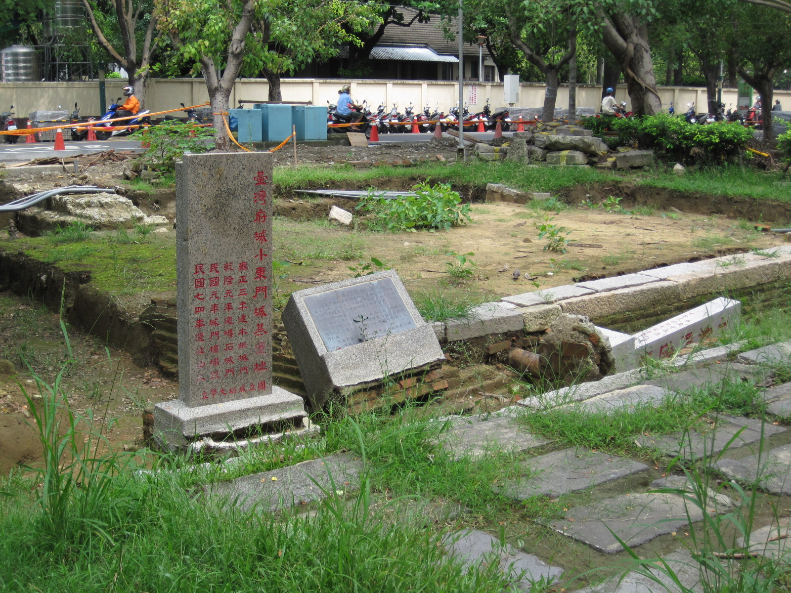 臺南小東門遺跡。